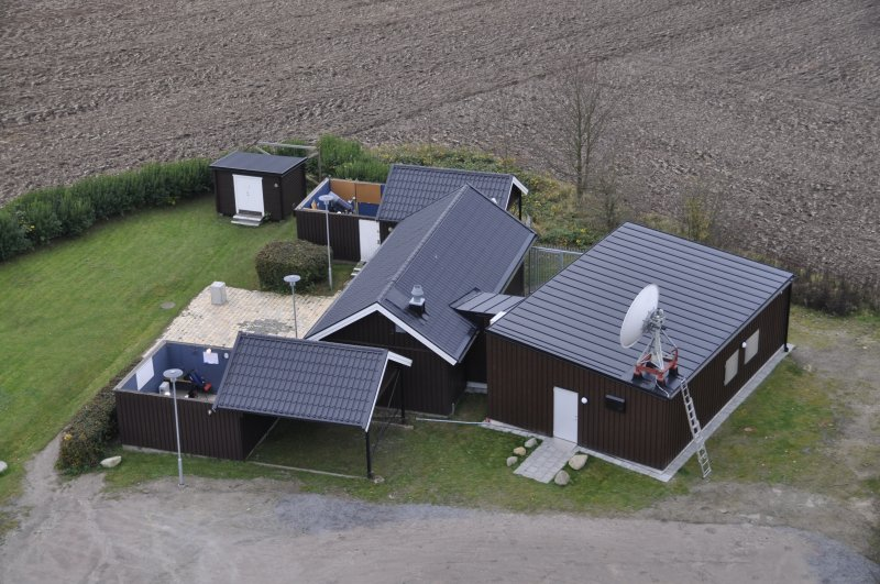 Bilden från nov 2011 visar observatoriets fem byggnader. De två sidohusen med huvudteleskopen har avdragbara tak. Till höger nybyggnaden 2011 som innehåller en föreläsningssal och på vars tak radioteleskopet är monterat. Foto Eva Dagnegård.